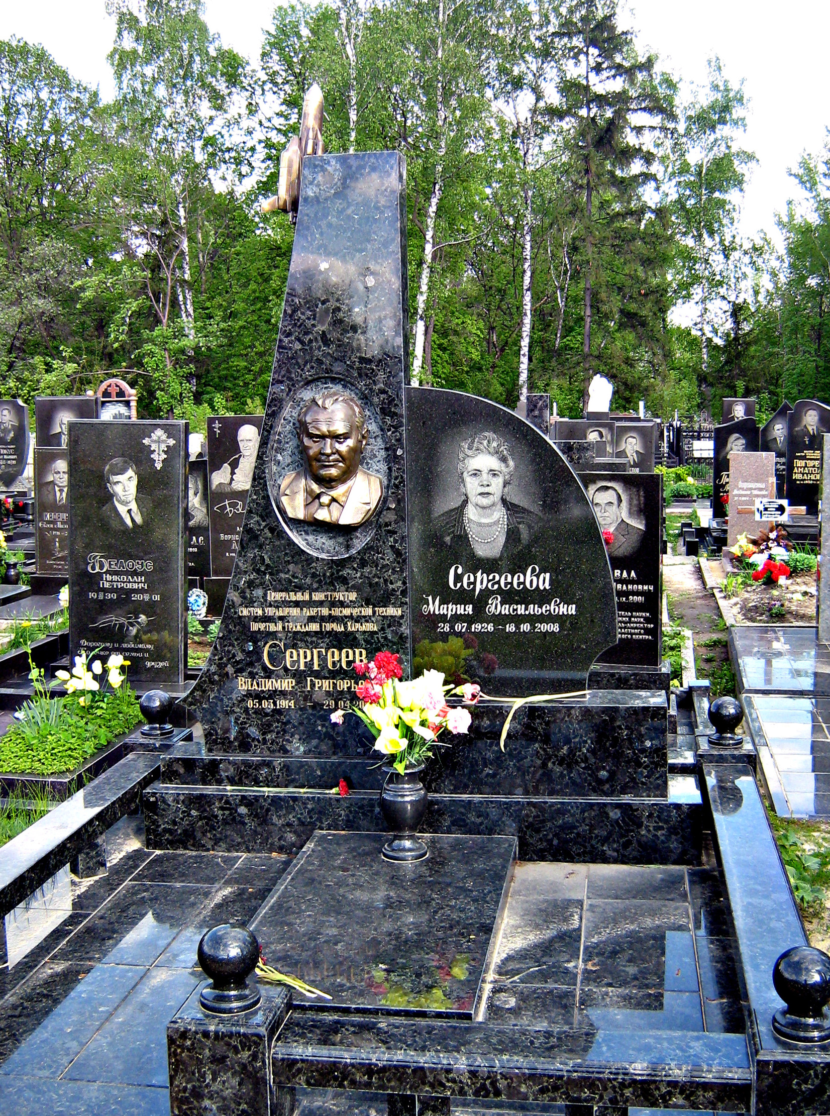 Памятник В. Г. Сергееву на втором кладбище. Харьков. Украина.